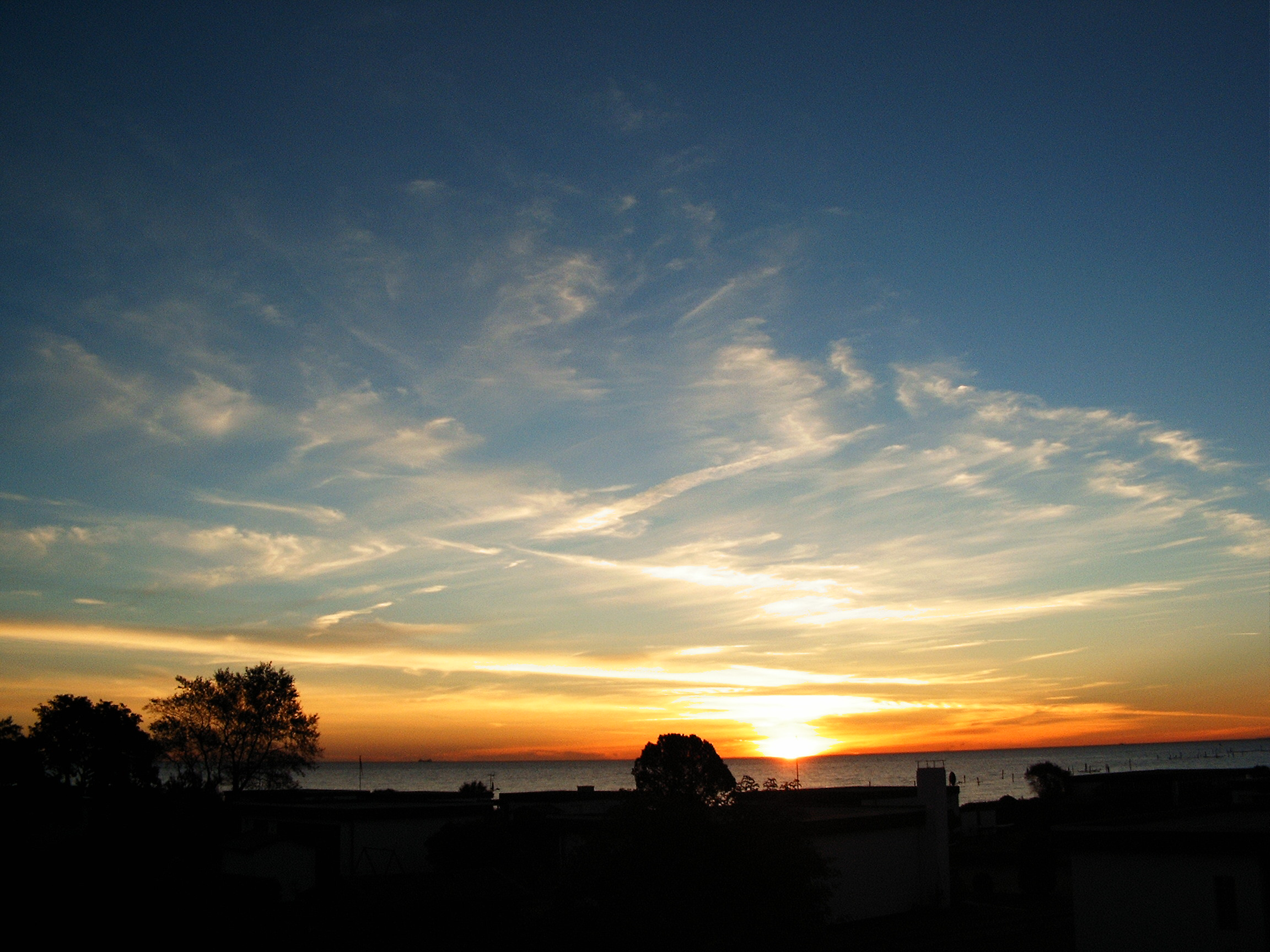 Großenbrode(Schleswig-Holstein):Sonnenaufgang am Südstrand